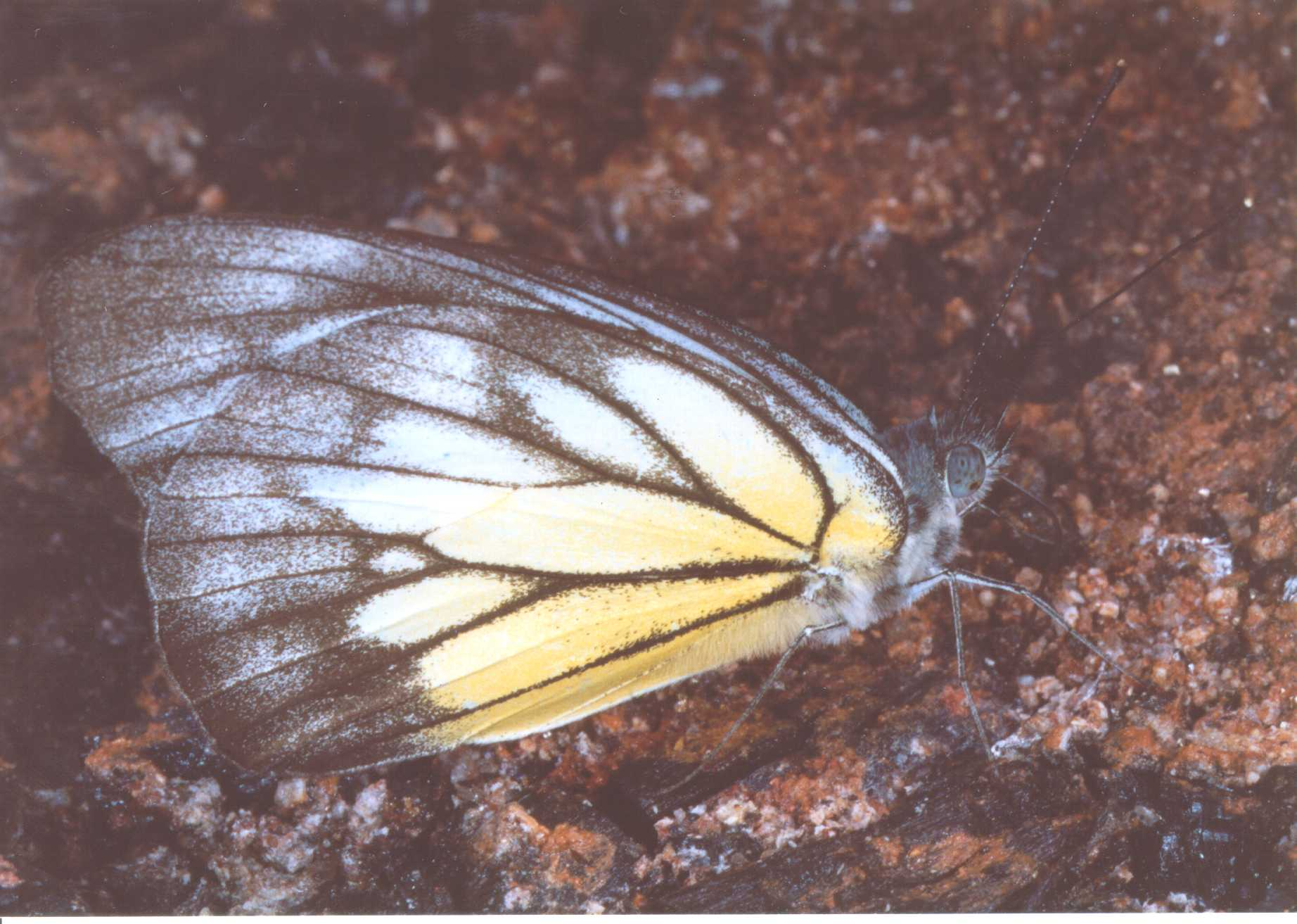 Rama rama. MT Abdullah.